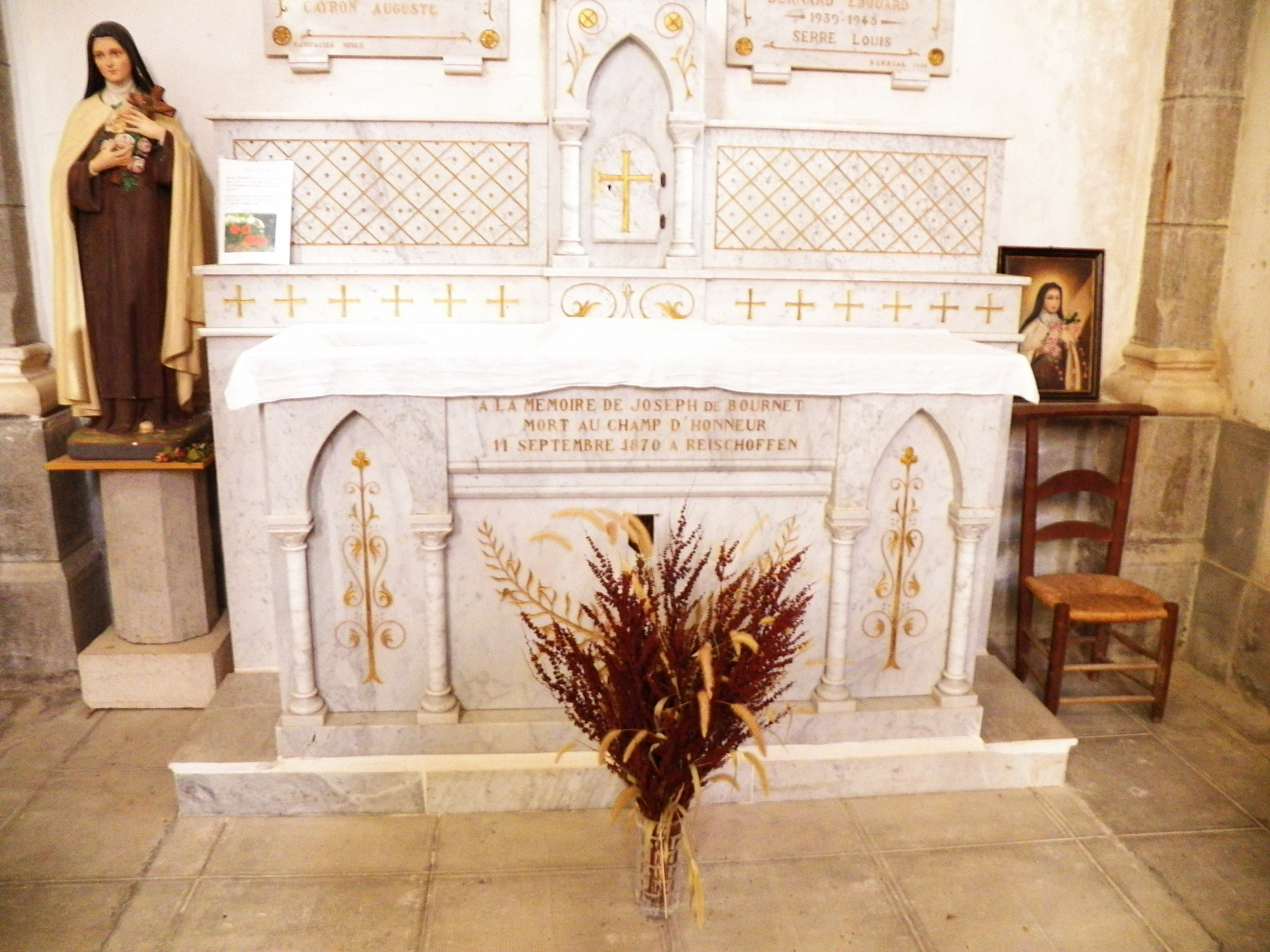 In memoriam d'un membre de la famille de Bournet mort en 1870 à Reischoffen